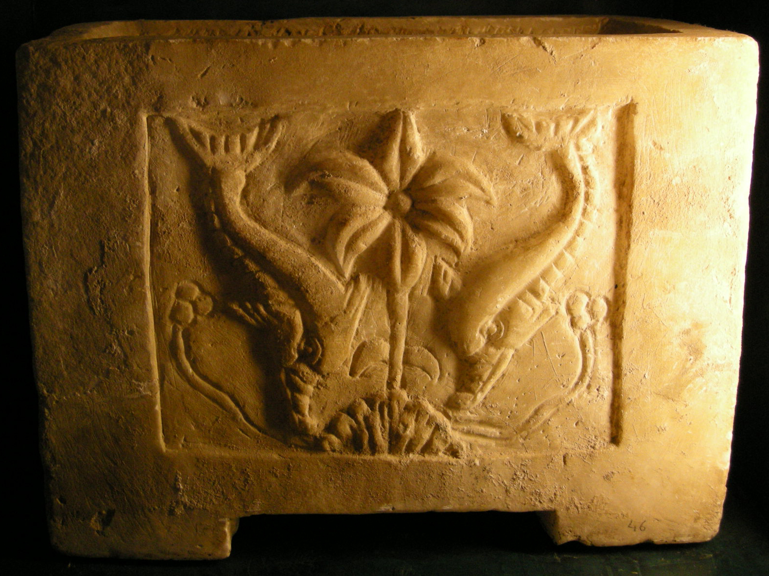 Museo guarnacci, urnetta, terza serie